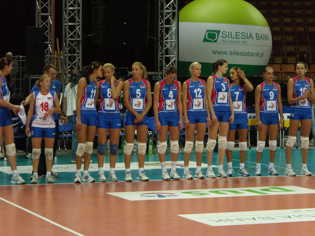 Zdjęcie zrobione podczas II memoriału Agaty Mróz-Olszewskiej w katowickim Spodku.